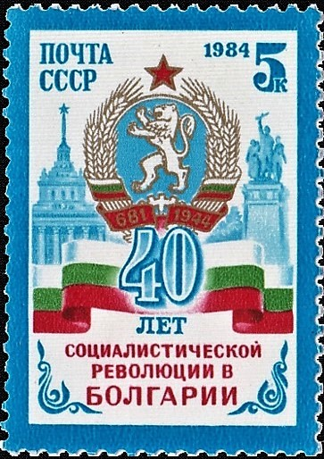 Почтовая марка СССР. 40 лет социалистической революции в Болгарии. Герб и флаг НРБ. Номер в каталоге ЦФА 5554